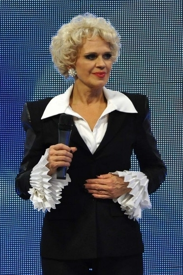 La presentadora de televisión Charytín.